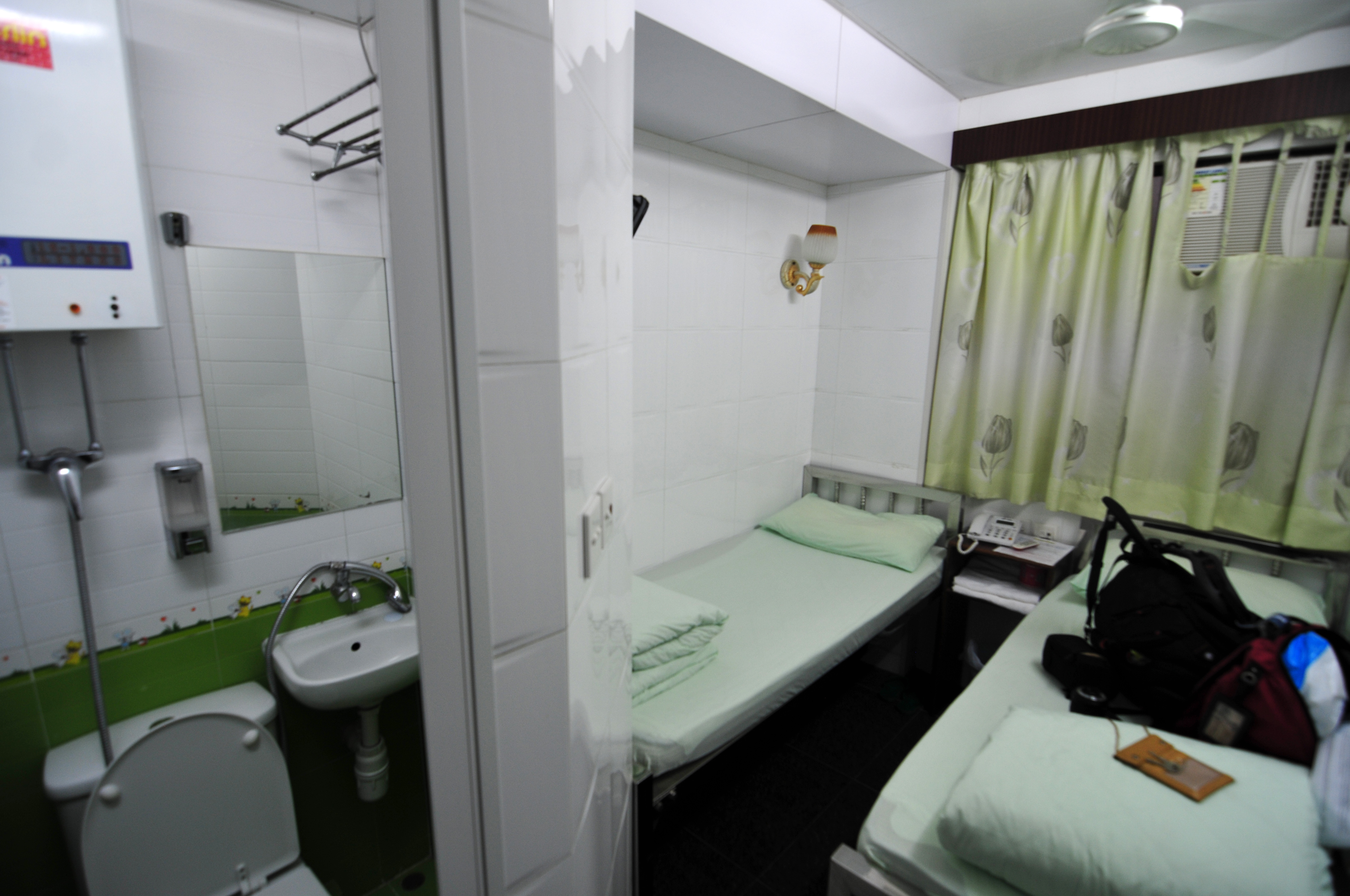 Wikimania 2013 Hongkong; Chungking Mansions Der Platz reicht eigentlich aus, Handtücher und Duschbad ausreichend vorhanden.